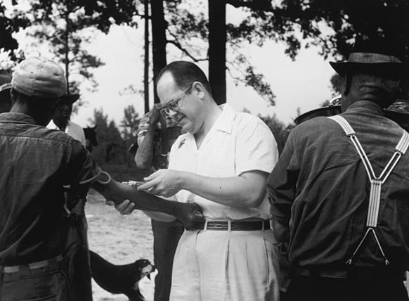 Examination, Tuskeegee study